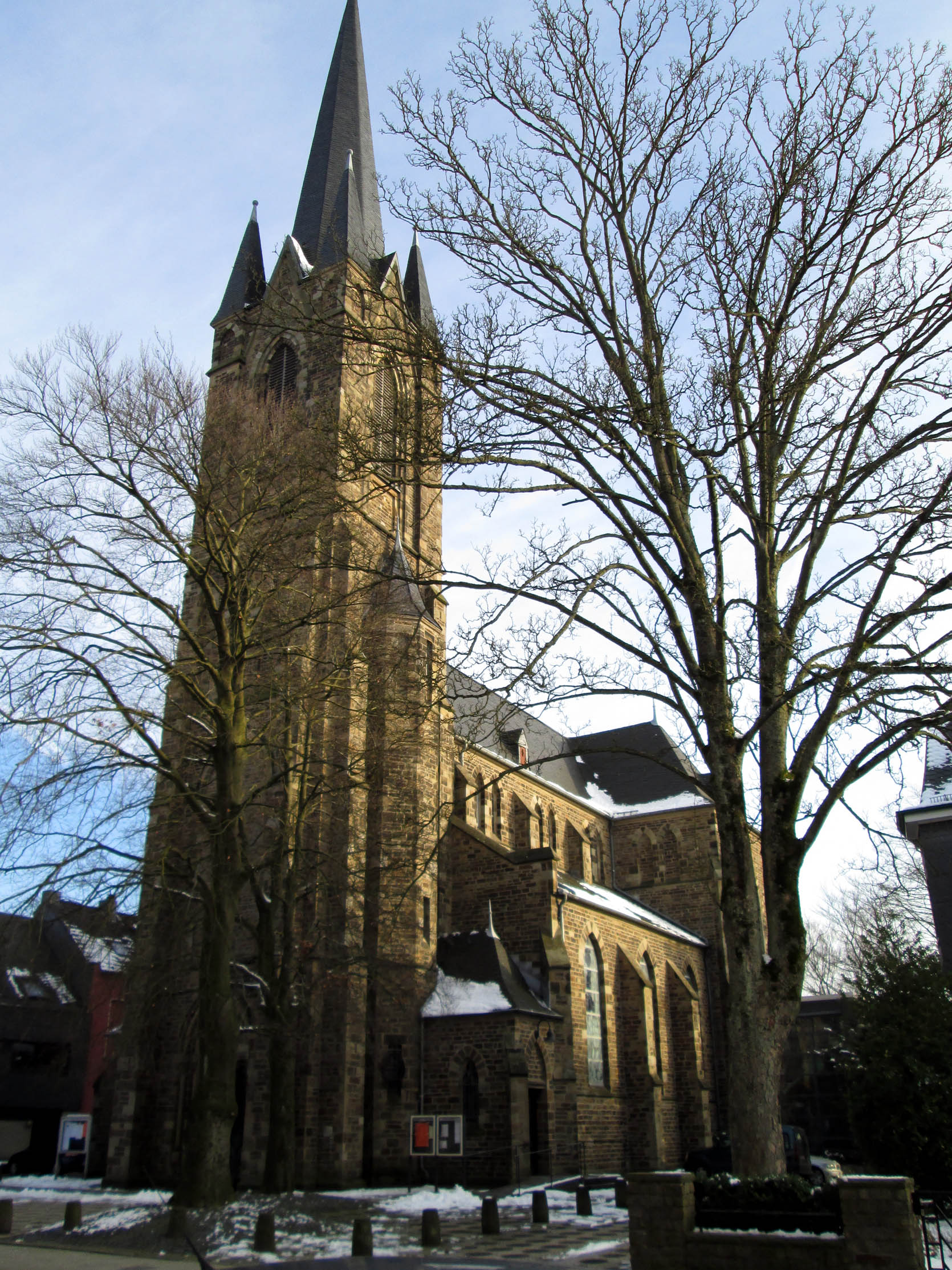 Die auch als „Heiligenhäuser Dom“ bezeichnete katholische Pfarrkirche St. Suitbertus in Heiligenhaus This is a photograph of an architectural monument.